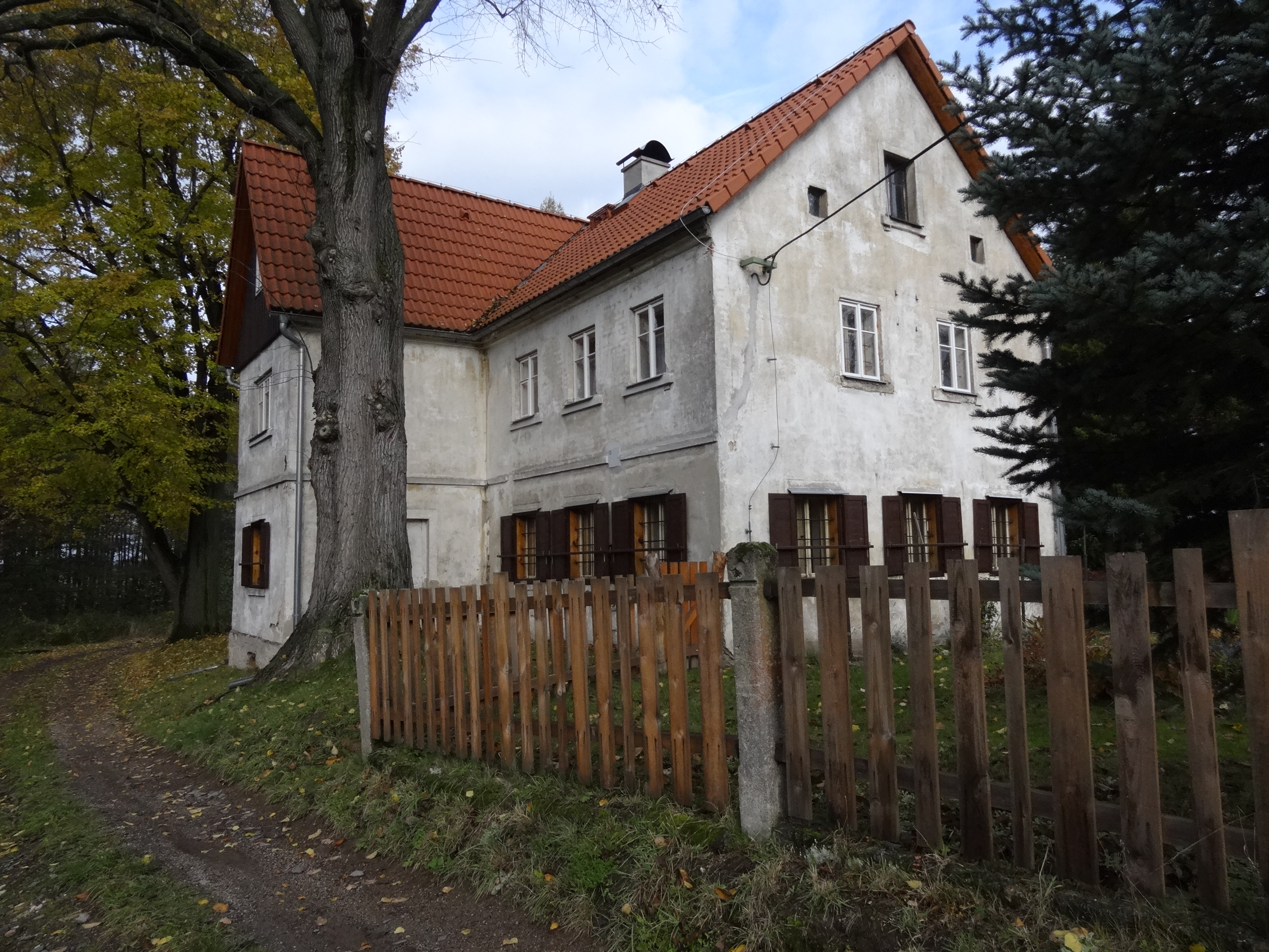 Polní Domky u Větrova jižně od Frýdlantu - dům K Zátiší če. 75